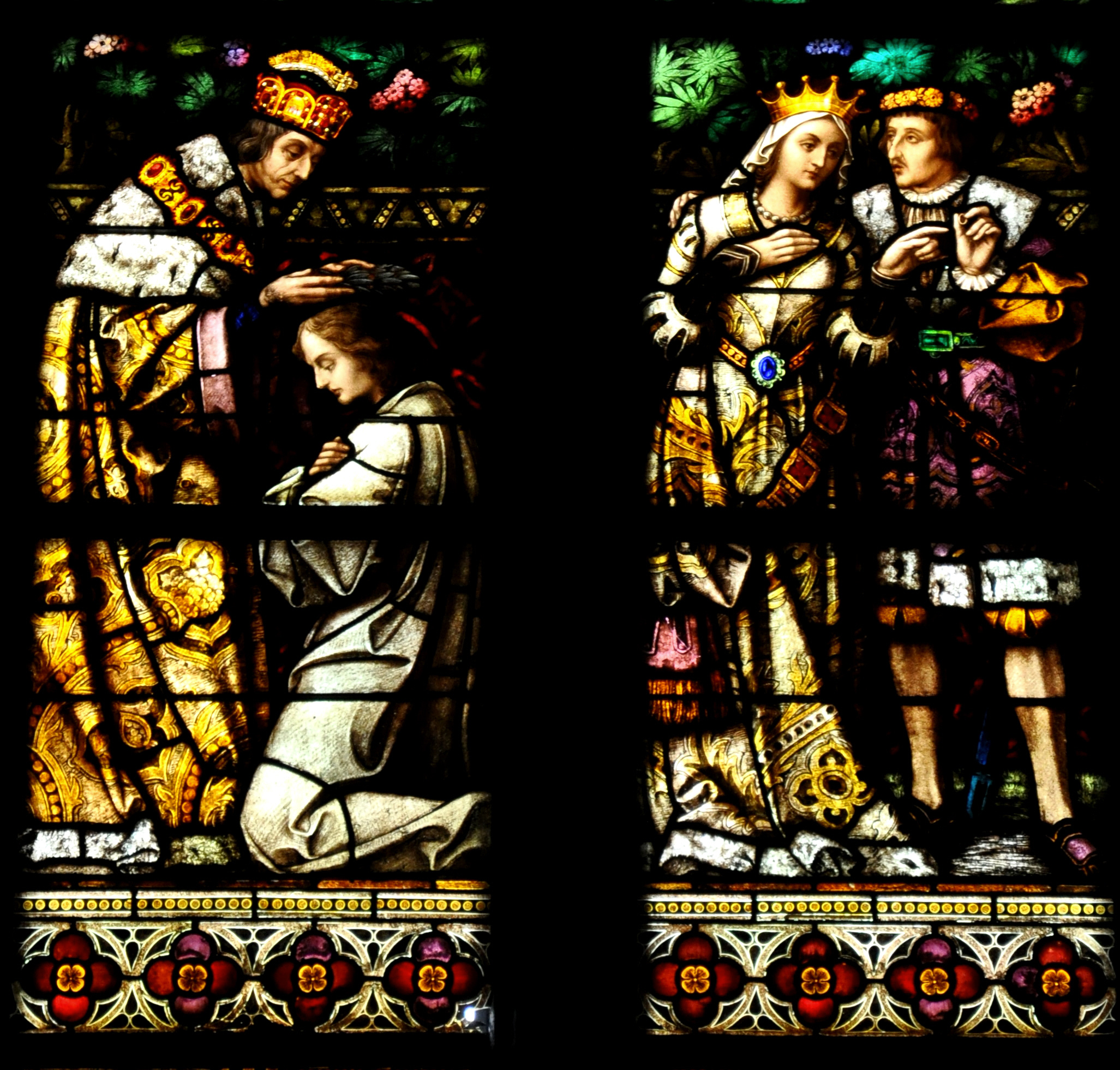 Linz, Neuer Dom, Glasfenster "Linz" (Böhm-Führer Nr. 12); Detail: links: Kaiser Maximilian I. krönt 1501 in Linz einen Dichter (Dichterkrönung), rechts: Hochzeit Ferinands I. mit Anna von Ungarn 1521 in Linz